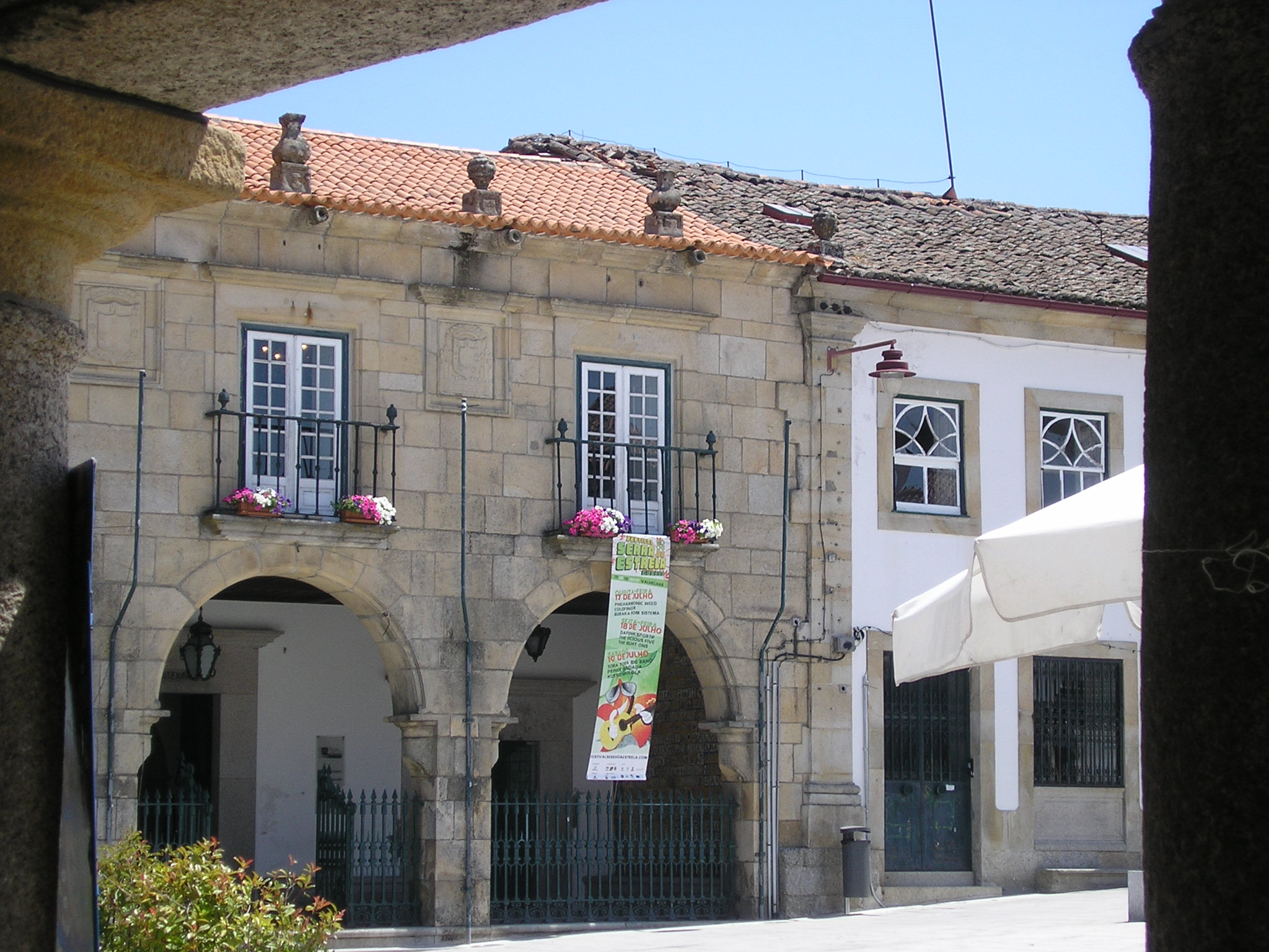 Paços do Concelho, edifício do séc. XVII.